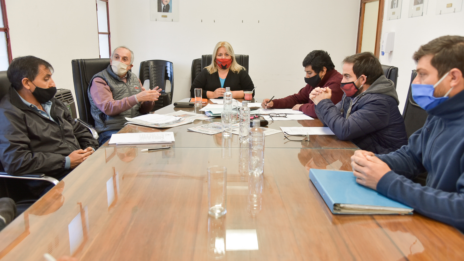 concejo deliberante de salta